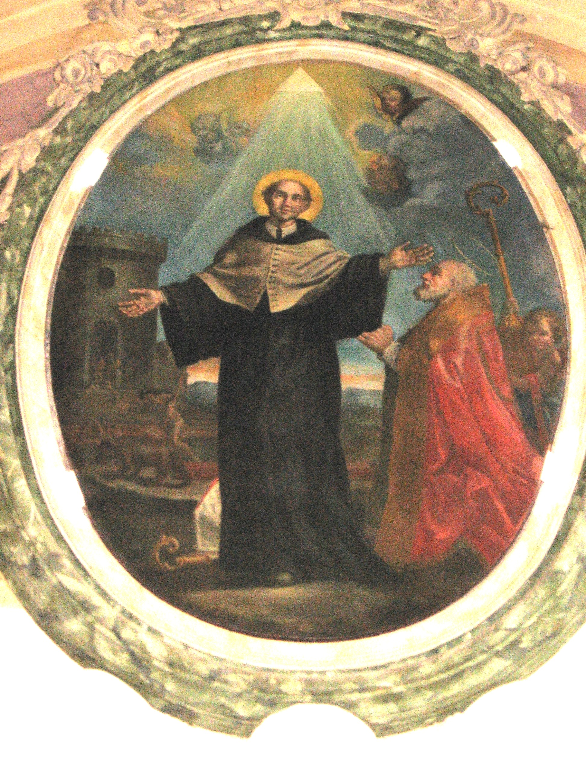 Pezzolo Valle Uzzone - Chiesa Parrocchiale - Pala d'altare di San Colombano.